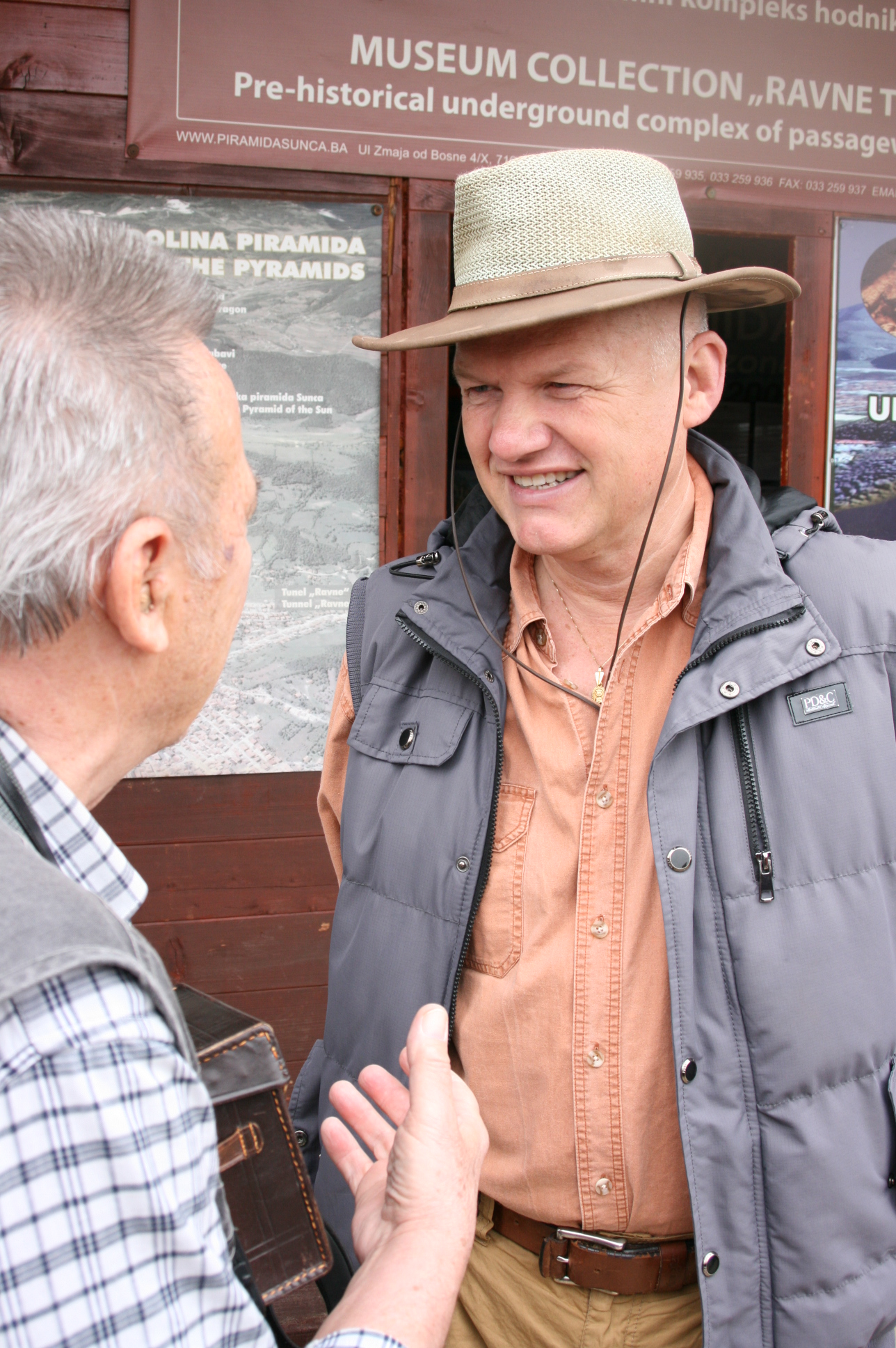 Egen bild, tagen den 3 maj 2014 i Visoko, Bosnien.